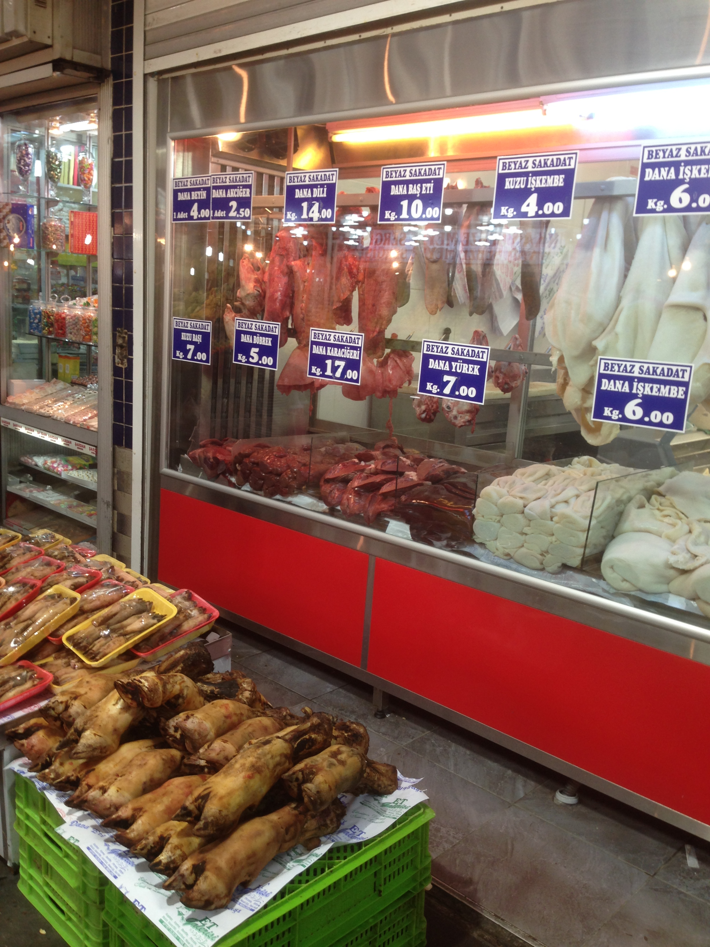 Ankara Hali'nde bir sakatatçı